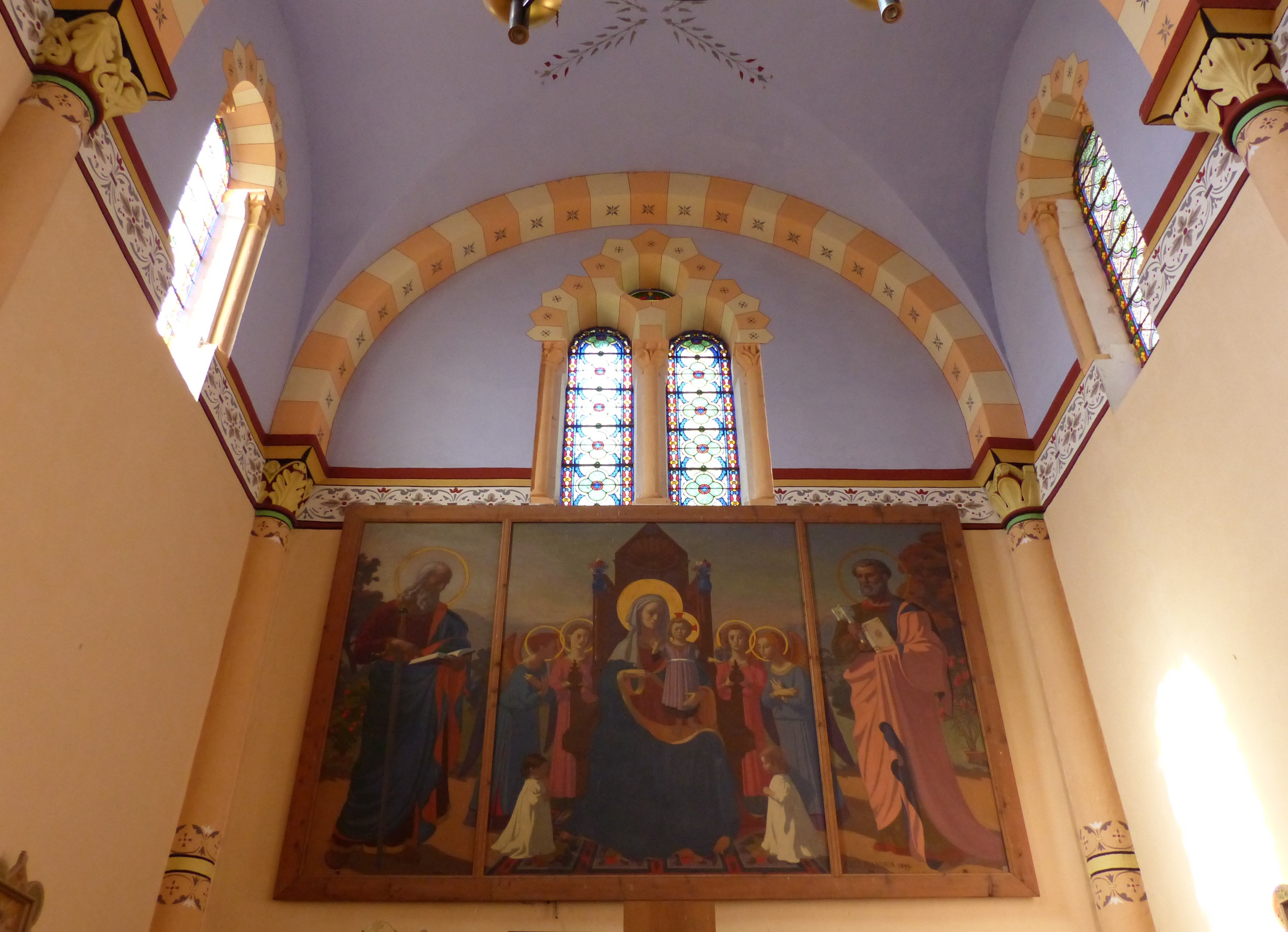 Intérieur de l'église St Pierre de Corenc - Peintures de Jules Flandrin